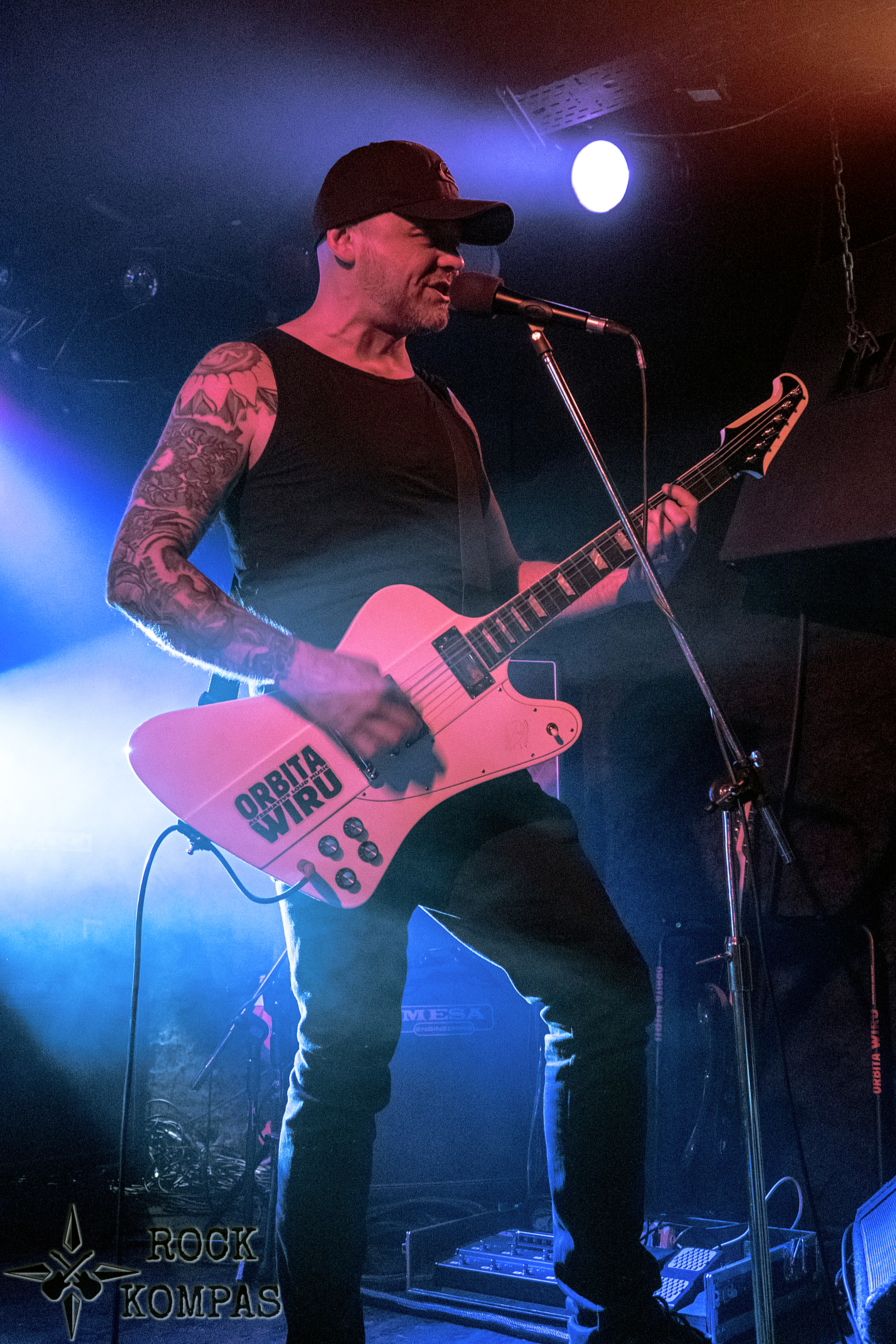 Tomasz Serwatko podczas występu grupy Orbita Wiru. 2019 Warszawa, klub Voo Doo